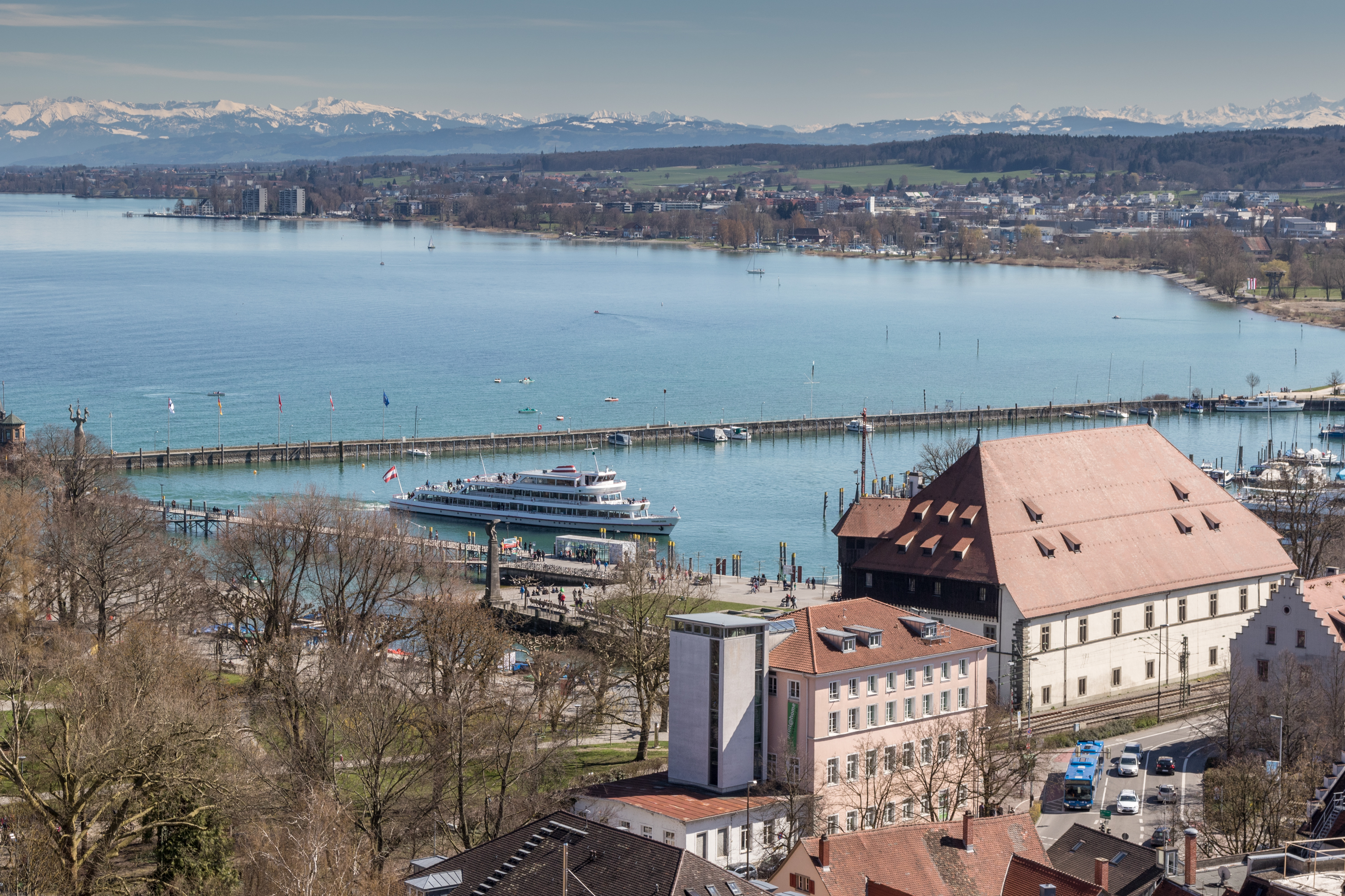 Konstanzer Trichter mit Konzilsgebäude im Vordergrund